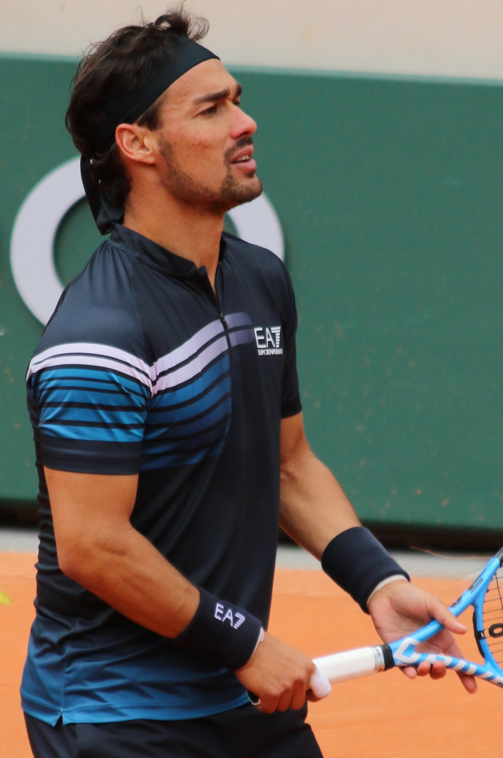 Fognini RG19 (2)